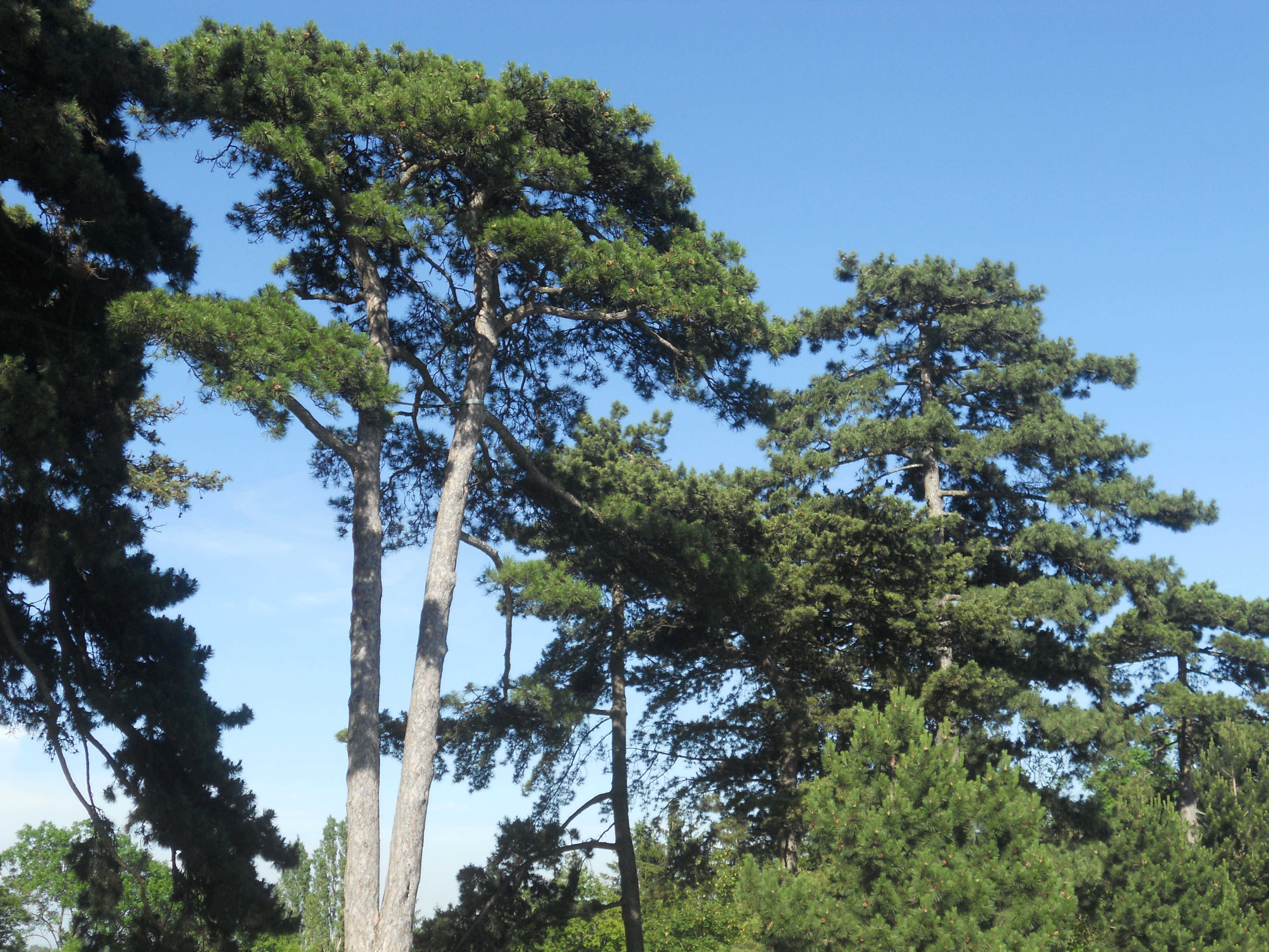 mehrere Kieferngruppen im Krapfenwaldlbad This media shows the natural monument in Vienna with the ID 50.